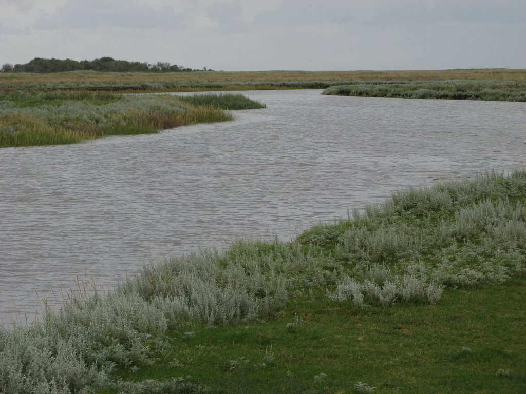 kwelder op Schiermonnikoog